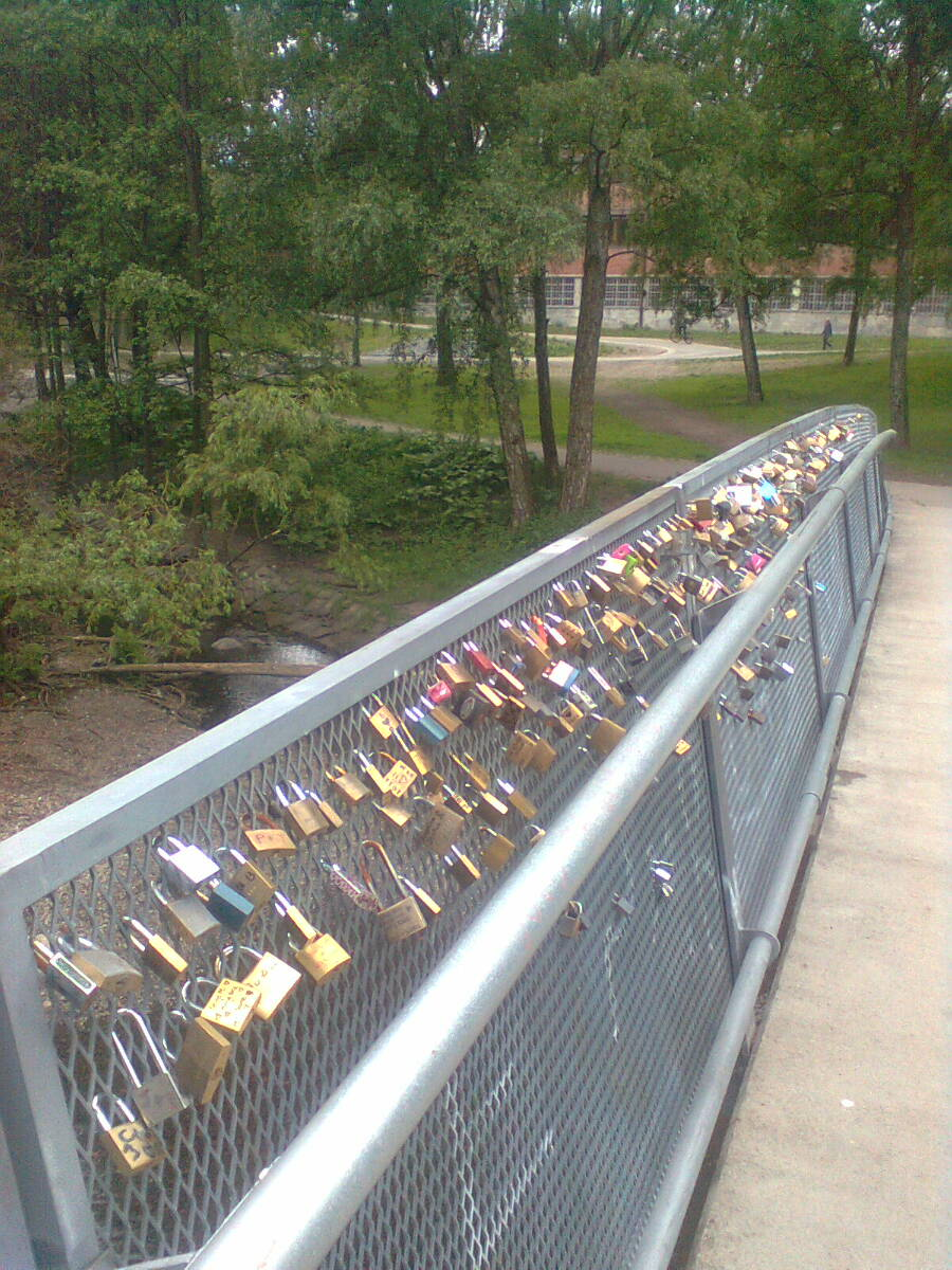 Hengelåser som tegn på kjærlighet er en utenlandsk tradisjon som en nå også kan finne på ei bru over Akerselva